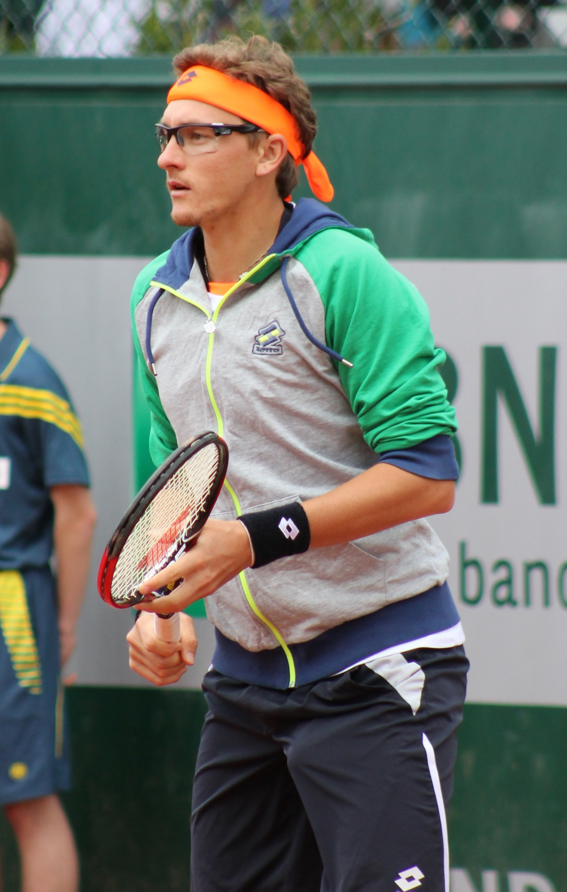 Istomin RG13 (6)